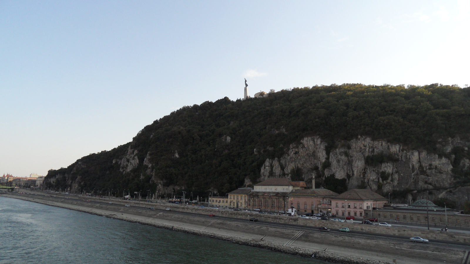 Gellért hegy dunai oldala az Erzsébet hídról fotózva. - Budapest, Szent Gellért rakpart és Raoul Wallenberg rakpart